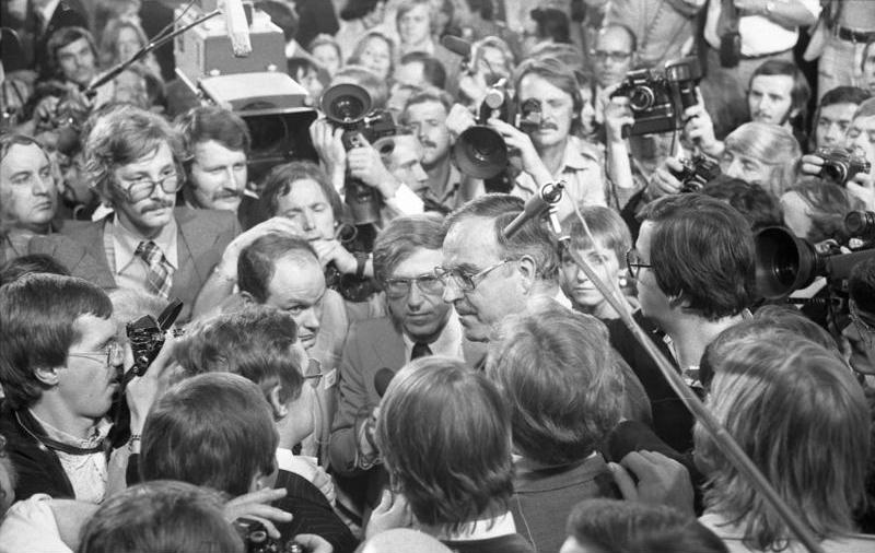 Bundestagswahl- Wahlnacht, Wahlparty in der CDU- Bundesgeschäftsstelle, Bonn. Kanzlerkandidat Helmut Kohl stellt sich den Fragen des Fernsehjournalisten Franz Alt